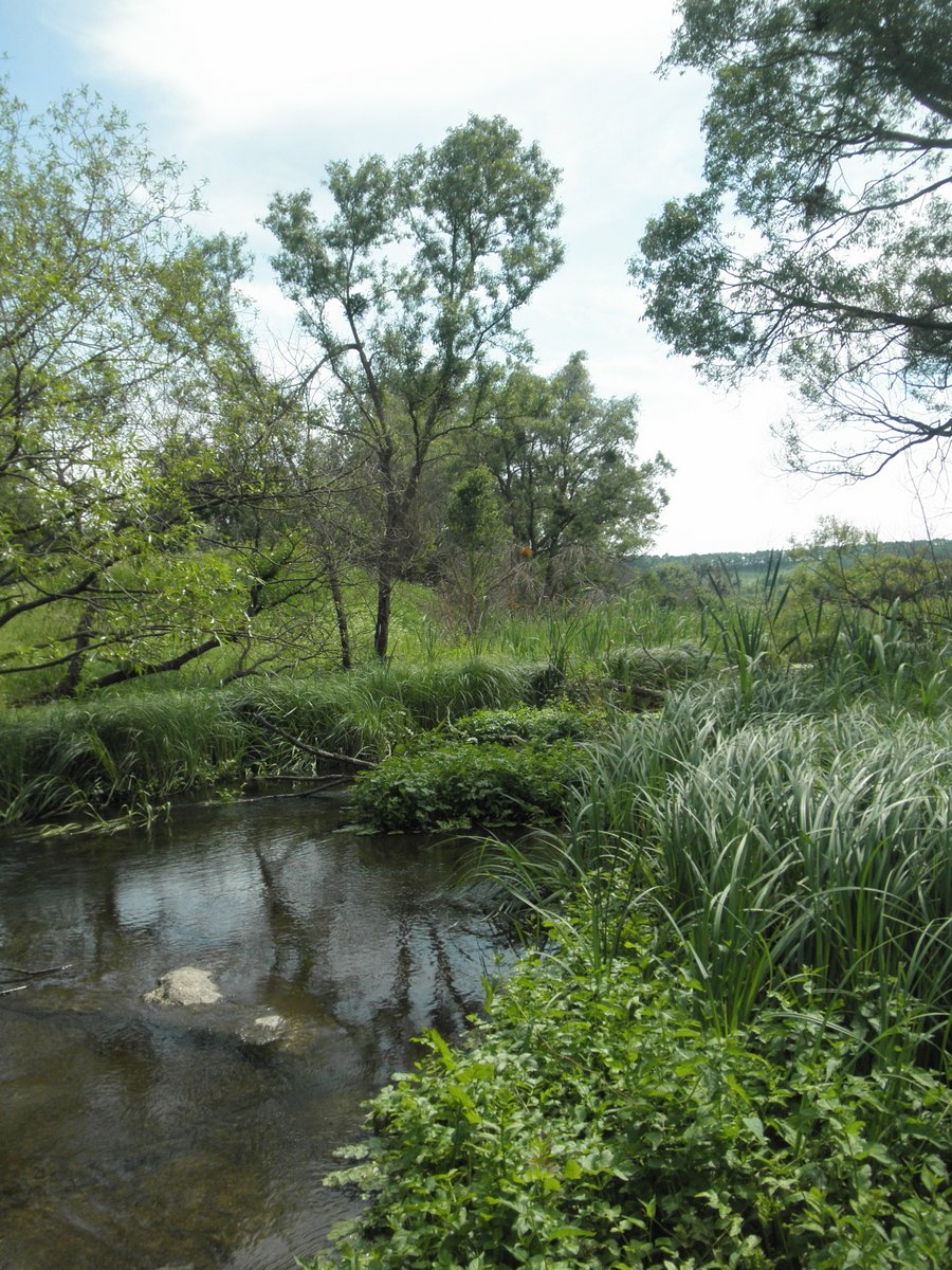 «Бочки», Знам'янський р-н, с. Калинівка